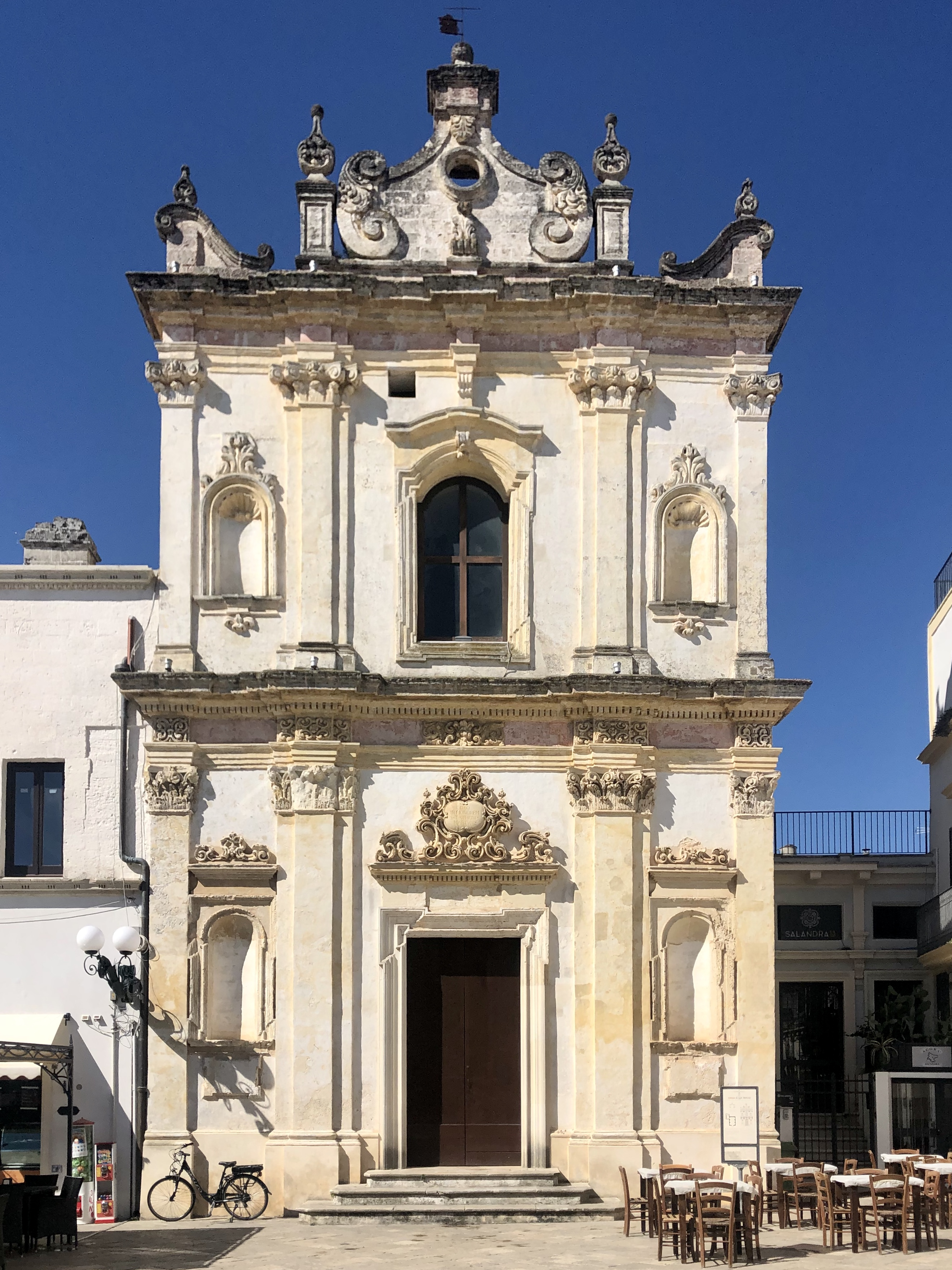 Facciata della Chiesa di San Trifone, Piazza Salandra, Nardò (LE)